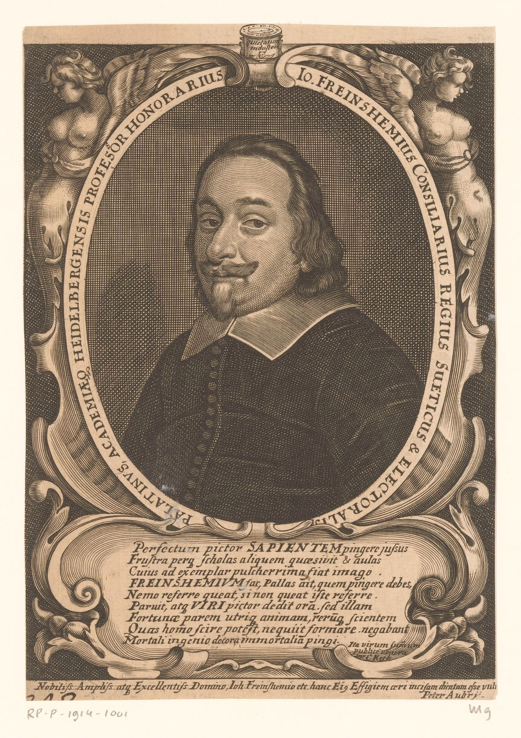 IdentificatieTitel(s): Portret van Johann FreinsheimObjecttype: prent Objectnummer: RP-P-1914-1001Catalogusreferentie: Nagler/Meyer II.376.9Opschriften / Merken: verzamelaarsmerk, verso, gestempeld: Lugt 2228VervaardigingVervaardiger: prentmaker: Peter Aubry (II) (vermeld op object)schrijver: C. Keck (vermeld op object)Plaats vervaardiging: StraatsburgDatering: 1656 - 1686Fysieke kenmerken: gravureMateriaal: papier Techniek: graveren (drukprocedé)Afmetingen: blad: h 178 mm (binnen de plaatrand afgesneden) × b 124 mm (binnen de plaatrand afgesneden)OnderwerpWat: historical personswatchWie: Johann FreinsheimVerwerving en rechtenVerwerving: aankoop 1905Copyright: Publiek domein